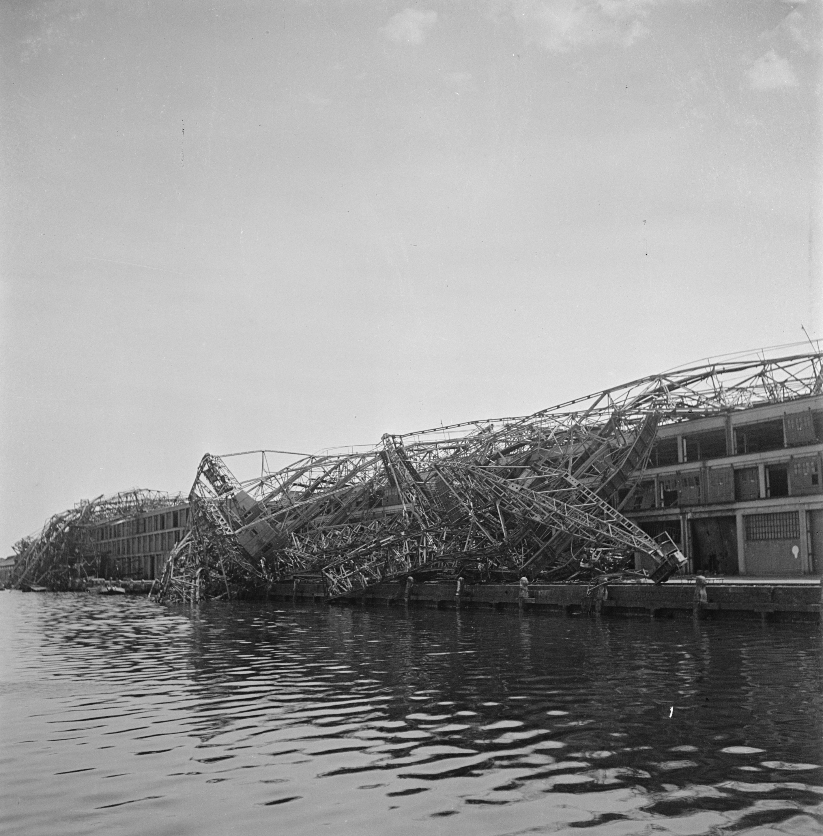 Collectie / Archief : Fotocollectie Anefo Reportage / Serie : Vernielingen: Amsterdamse haven Beschrijving : Zgn. " transporteurs" op de terreinen van de Stoomvaart Maatschappij Nederland aan de Sumatrakade Datum : mei 1945 Locatie : Amsterdam, Noord-Holland Trefwoorden : havens, tweede wereldoorlgo, vernielingen Instellingsnaam : SMN Fotograaf : Fotograaf Onbekend / Anefo Auteursrechthebbende : Nationaal Archief Materiaalsoort : Negatief (zwart/wit) Nummer archiefinventaris : bekijk toegang 2.24.01.03 Bestanddeelnummer : 900-2950